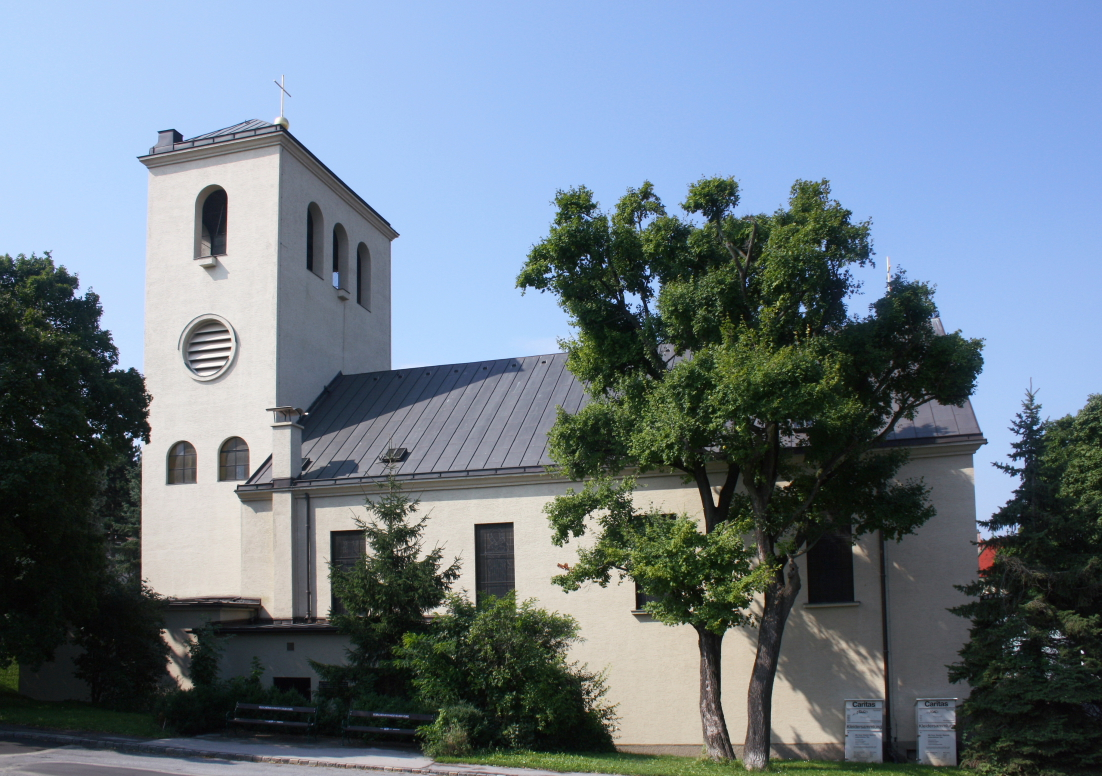 Die Ostansicht der Leopoldskirche (Klosterneuburg)